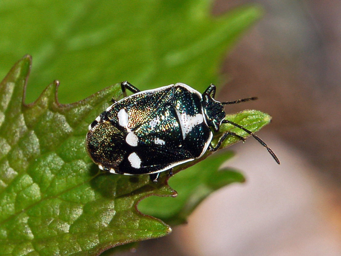 Eurydema oleracea. Gattorna, Genova, Italy